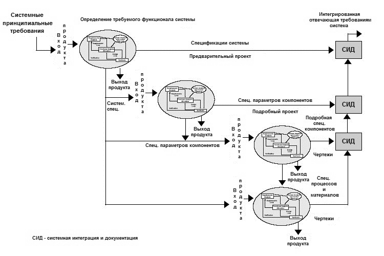 Системотехническая модель спецификаций и уровней разработки.